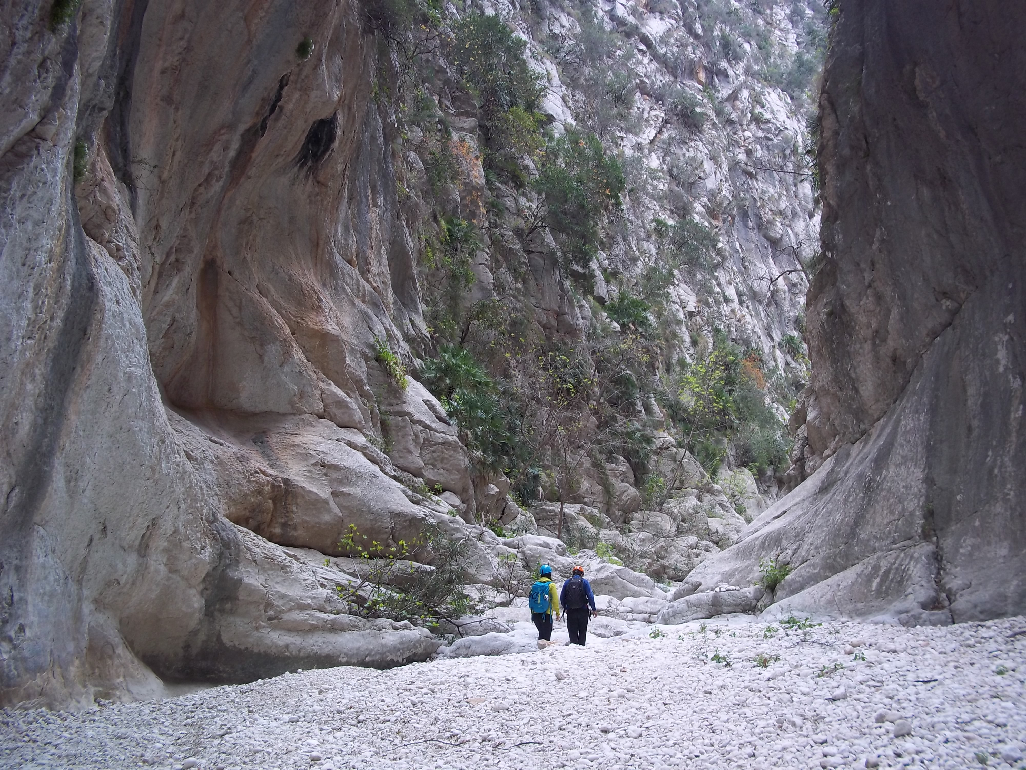 Diversos detalls del Barranc de l'Infern a la Vall de Laguar